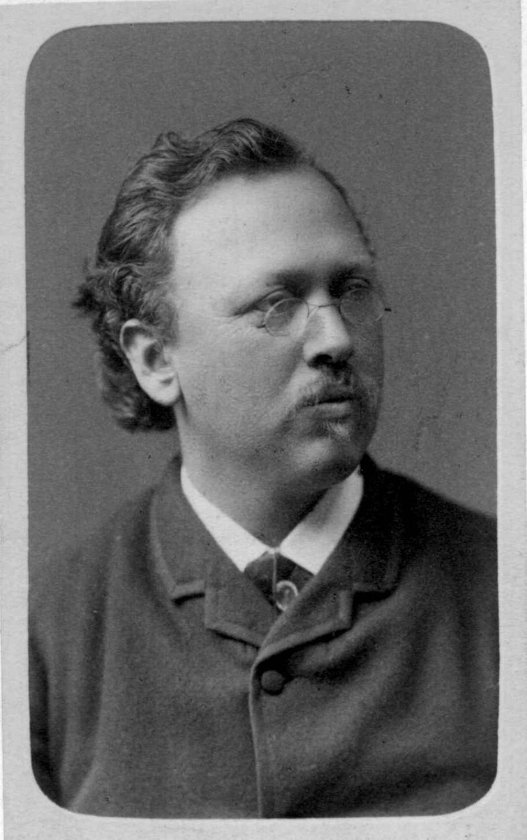 Elling Bolt Holst (1849- 1915) var en norsk matematiker og barnebokforfatter.